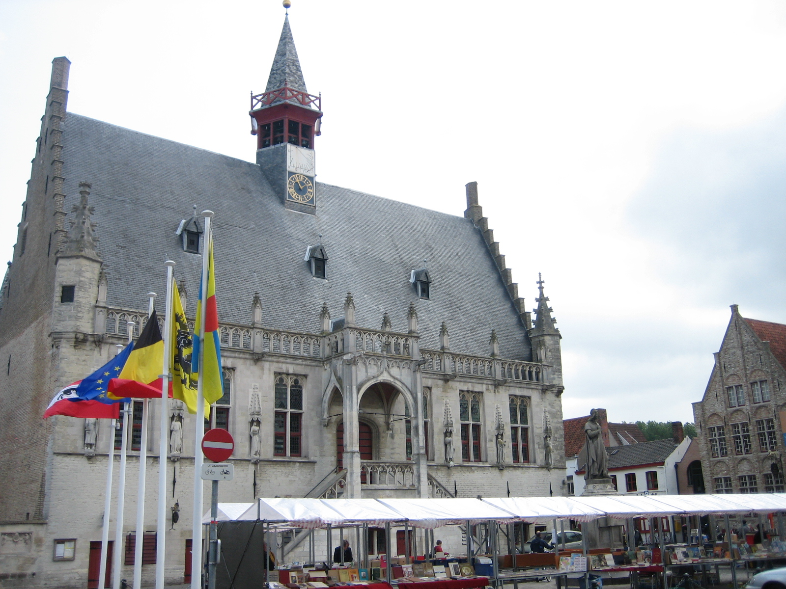 D'Stadhaus vun Damme (Belsch)Damme